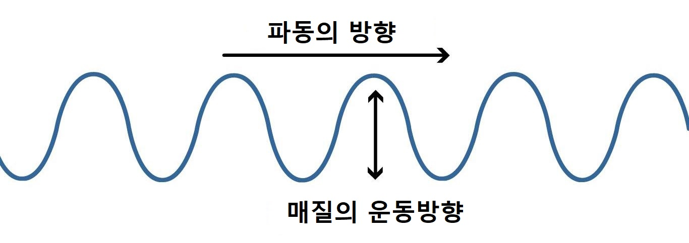 횡파를 설명하는 그림